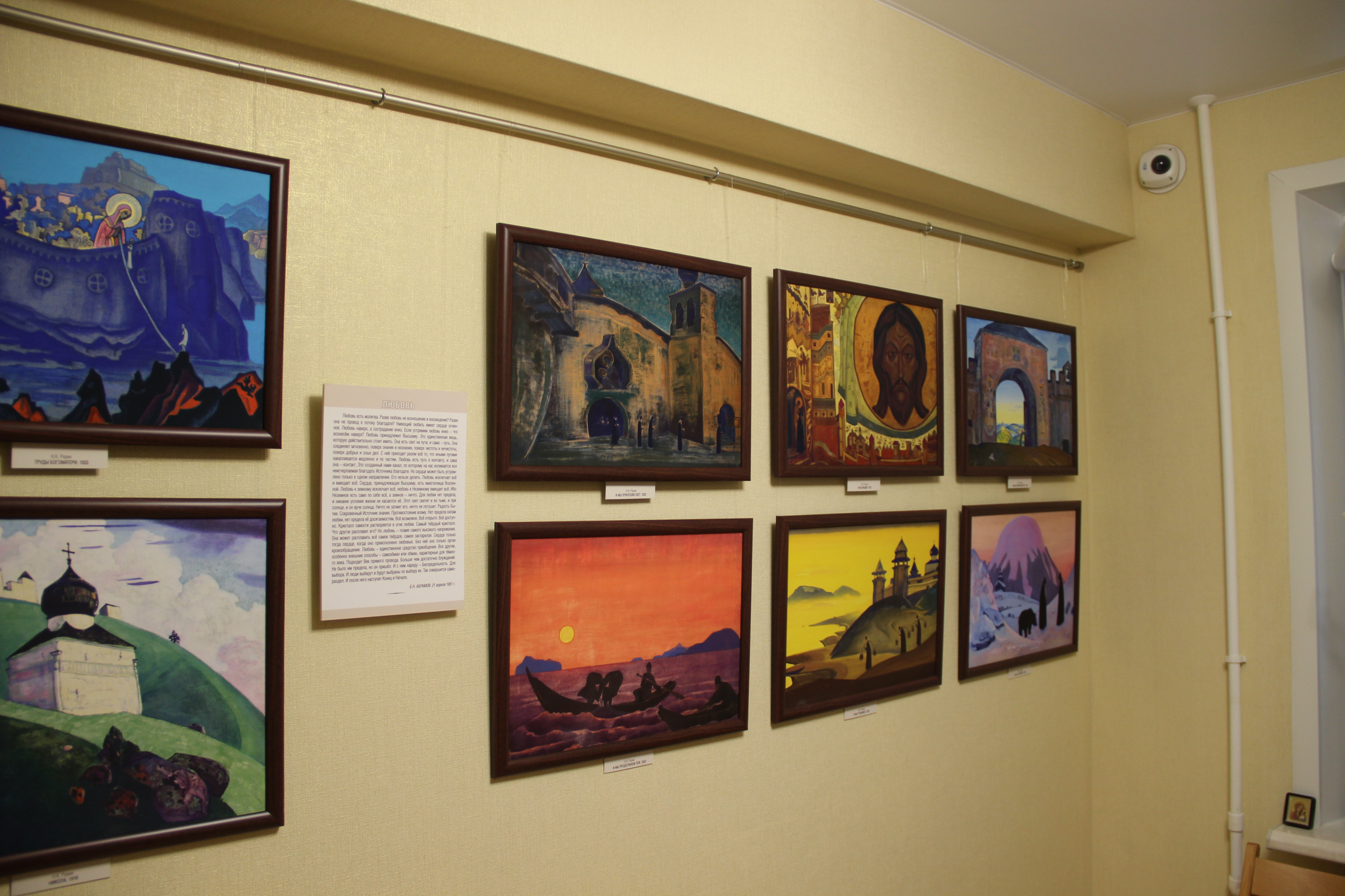 Музей Б. Н. Абрамова в г. Венёве. Репродукции картин Н. К. Рериха. 2017 г.